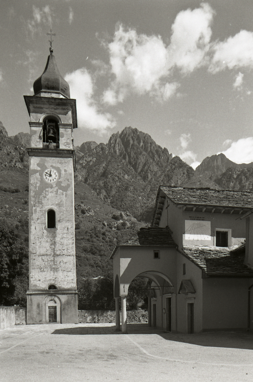 Servizio fotografico : Premosello-Chiovenda, 1980 / Paolo Monti. - Strisce: 4, Fotogrammi complessivi: 17 : Negativo b/n, gelatina bromuro d'argento/ pellicola ; 35 mm. - ((Sul portanegativi: N[I]KM[AT]-EL FP4 e iscrizione: " Cuzzago 1-17/ Fond. Enr. Monti". - La serie è identificata da Monti con segni grafici e distinta dalla successiva. - Confronta scheda 3975Lpbn01-17. - Occasione: Documentazione per la pubblicazione: Rizzi Enrico, "Walser: gli uomini della montagna", Valstrona, Lo Strona, 1981. - Fonte: Fattura di Paolo Monti: IV. Commesse/ Fattura n. 34/ Riprese fotografiche eseguite nella regione dei Walser (1981/10/08), presso Archivio Paolo Monti. N. 195 foto formato 24x30 o 20x24. Su ordinazione del Signor Enrico Rizzi. - Fonte: Monografia di Rizzi, Enrico: Walser: gli uomini della montagna, Valstrona, Lo Strona (1981)